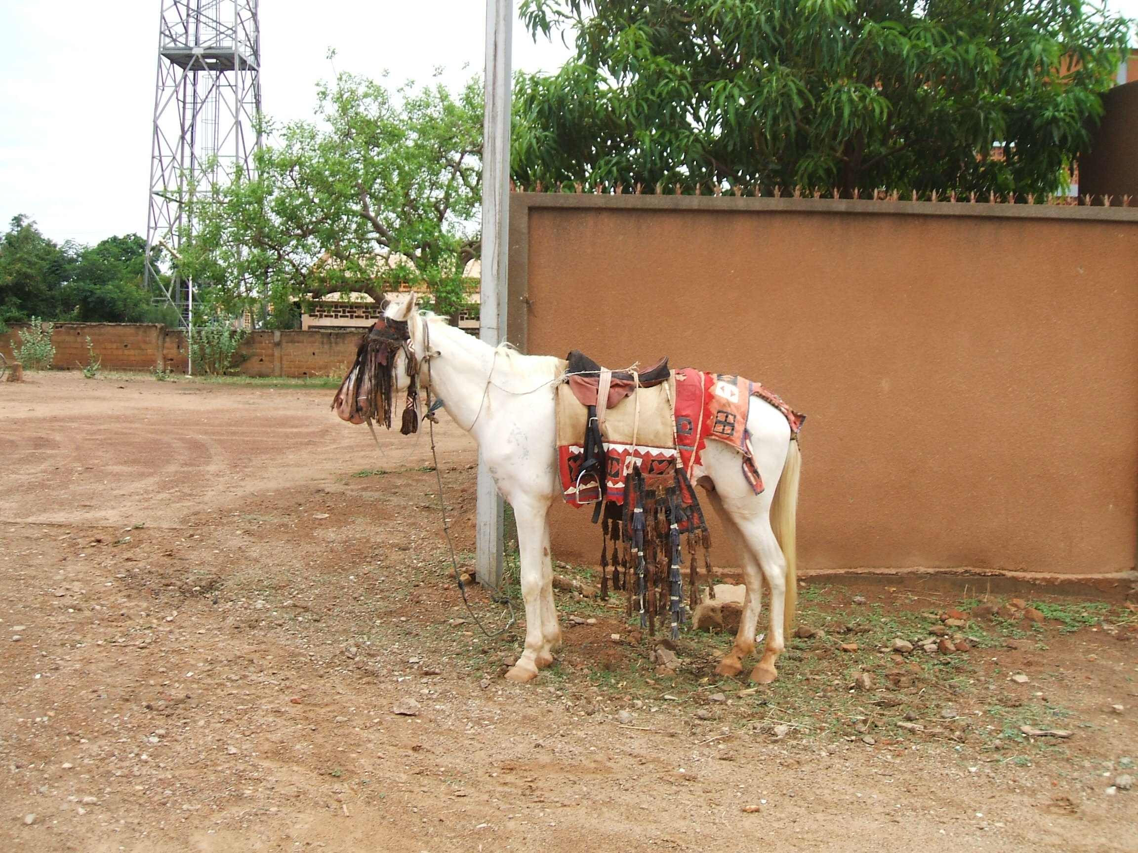 Cheval harnaché pour un cortège de mariage. Enclos de la cathédrale de Ouagadougou.